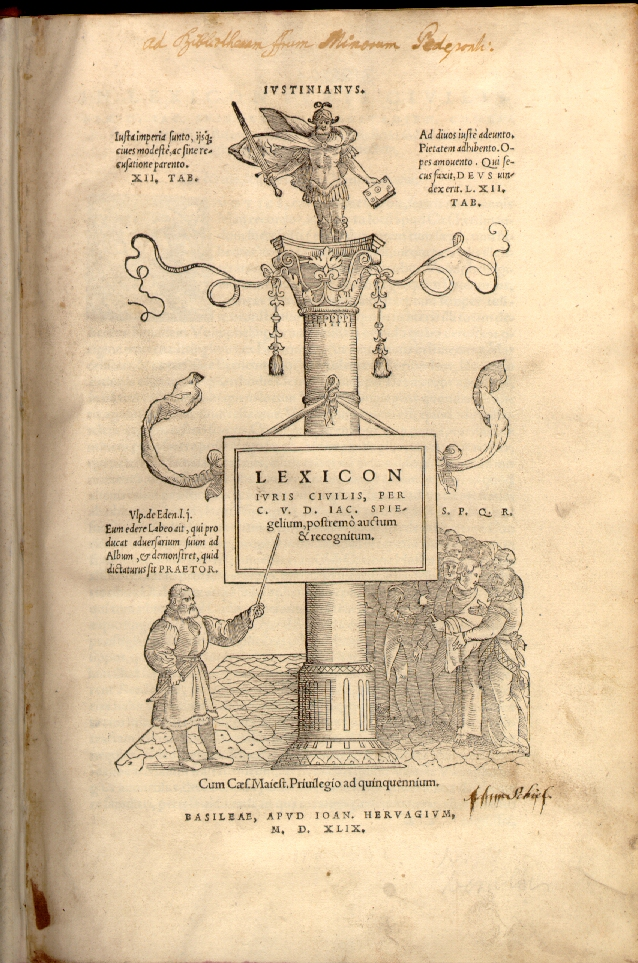 Titelblatt zu: Jakob Spiegel. Lexicon Ivris Civilis. Basel, 1549